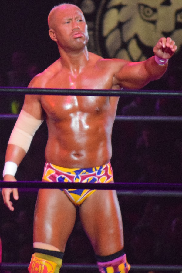 2017年2月11日 大阪府立体育会館 「THE NEW BEGINNING in OSAKA」 本間朋晃